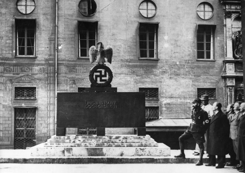 München, Ehrenmal in der Feldherrnhalle München: Das Ehrenmal an der Feldherrnhalle. 38237-33